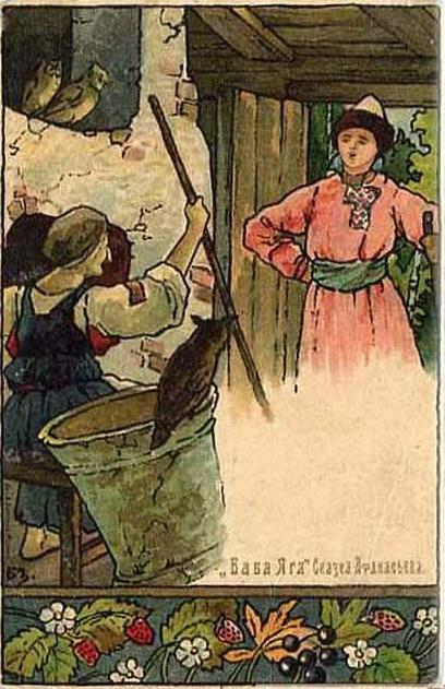 Почтовая открытка